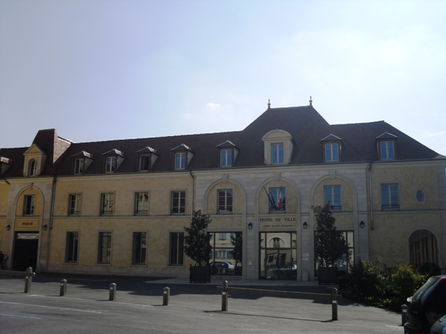 Hôtel-de-Ville de Verrières-le-Buisson (91)